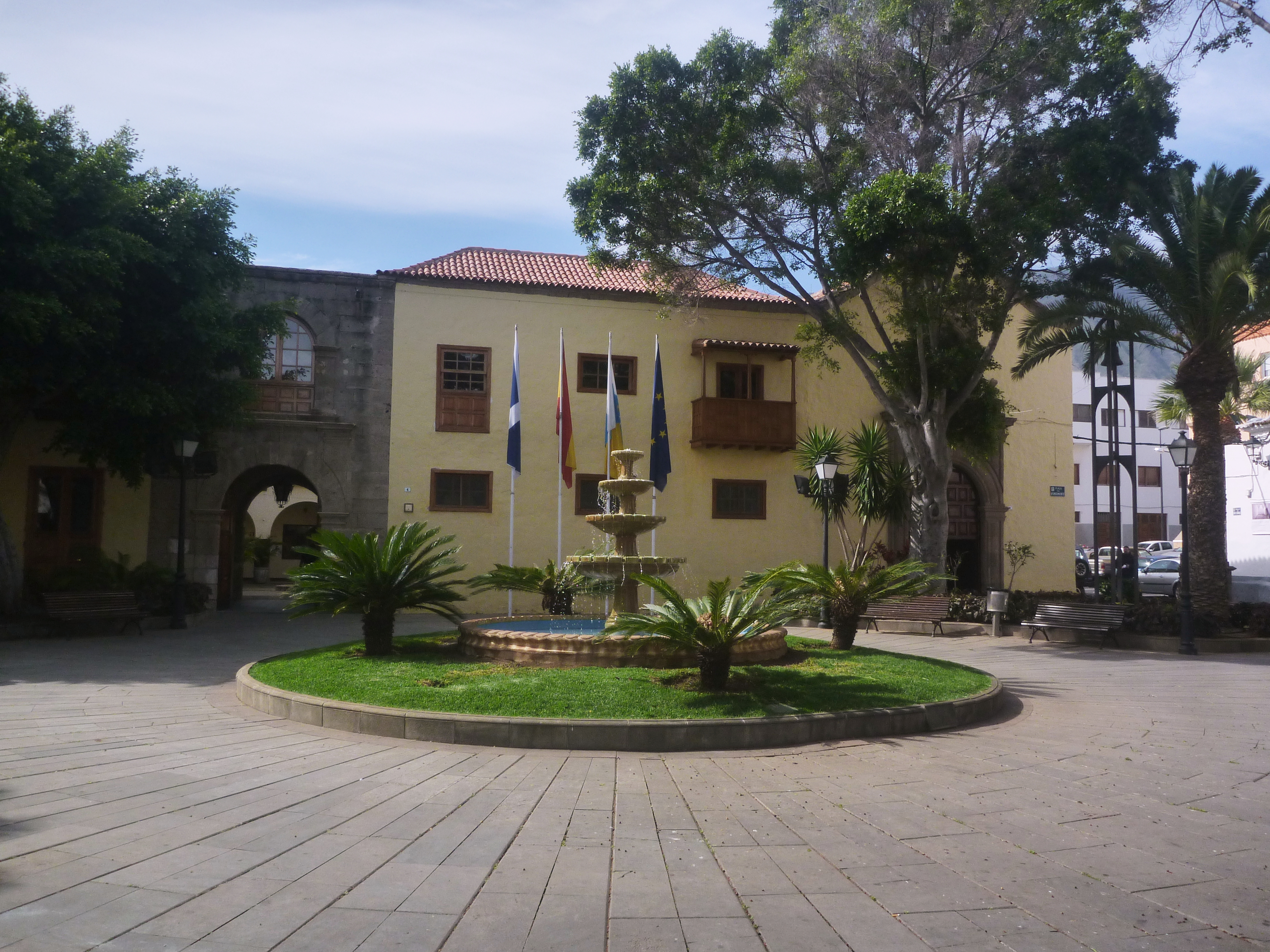 Ayuntamiento de Güímar e Iglesia situados en el antiguo Convento de Santo Domingo, siglo XVII, Güímar, Tenerife.